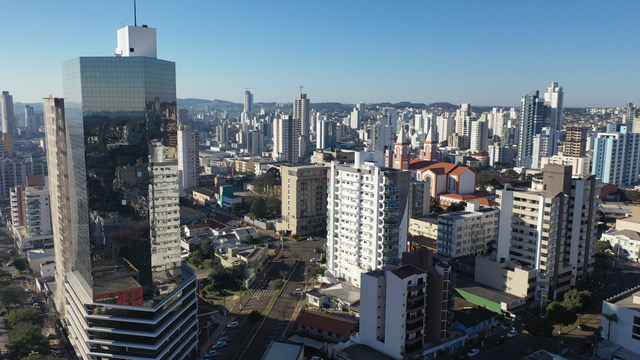 Vista da região central